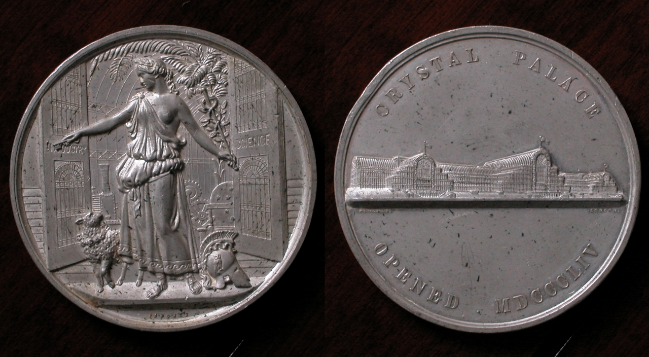 1854 Crystal Palace Medallion